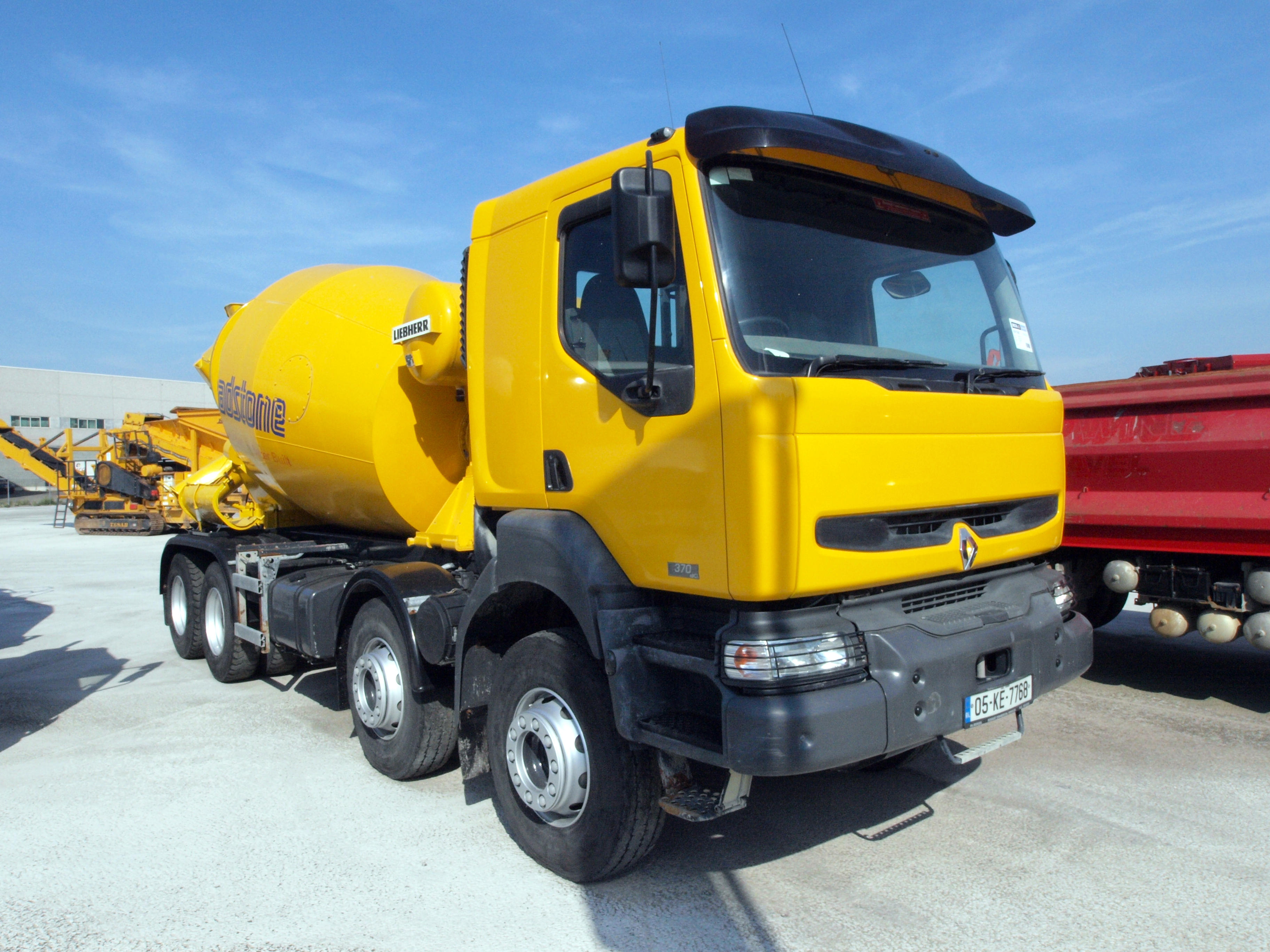 Renault 370 Kerix Liebherr